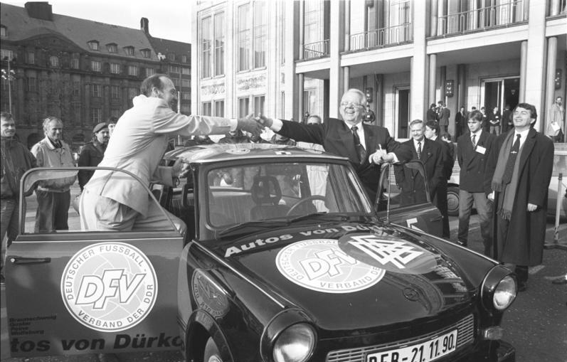 Deutsche Fußball-Vereinigung ADN-ZB/Kluge/20.11.90/Leipzig: Fußball-Vereinigung In Leipzig wurde am Mittwoch die deutsche Fußballvereinigung vollzogen. Als Geschenk zum Eintritt in den Deutschen Fußballbund (DFB) überreichte der Präsident des Nordostdeutschen Fußballverbandes, Hans-Georg Moldenhauer (l.) DFB-Präsident Hermann Neuberger (r.) einen Trabant mit einer Spezialnummer. Abgebildete Personen: Moldenhauer, Hans-Georg: Präsident des Deutschen Fußballbundes, Bundesrepublik Deutschland Neuberger, Hermann: Präsident des Deutschen Fußballbundes, Bundesrepublik Deutschland (GND 119128411)